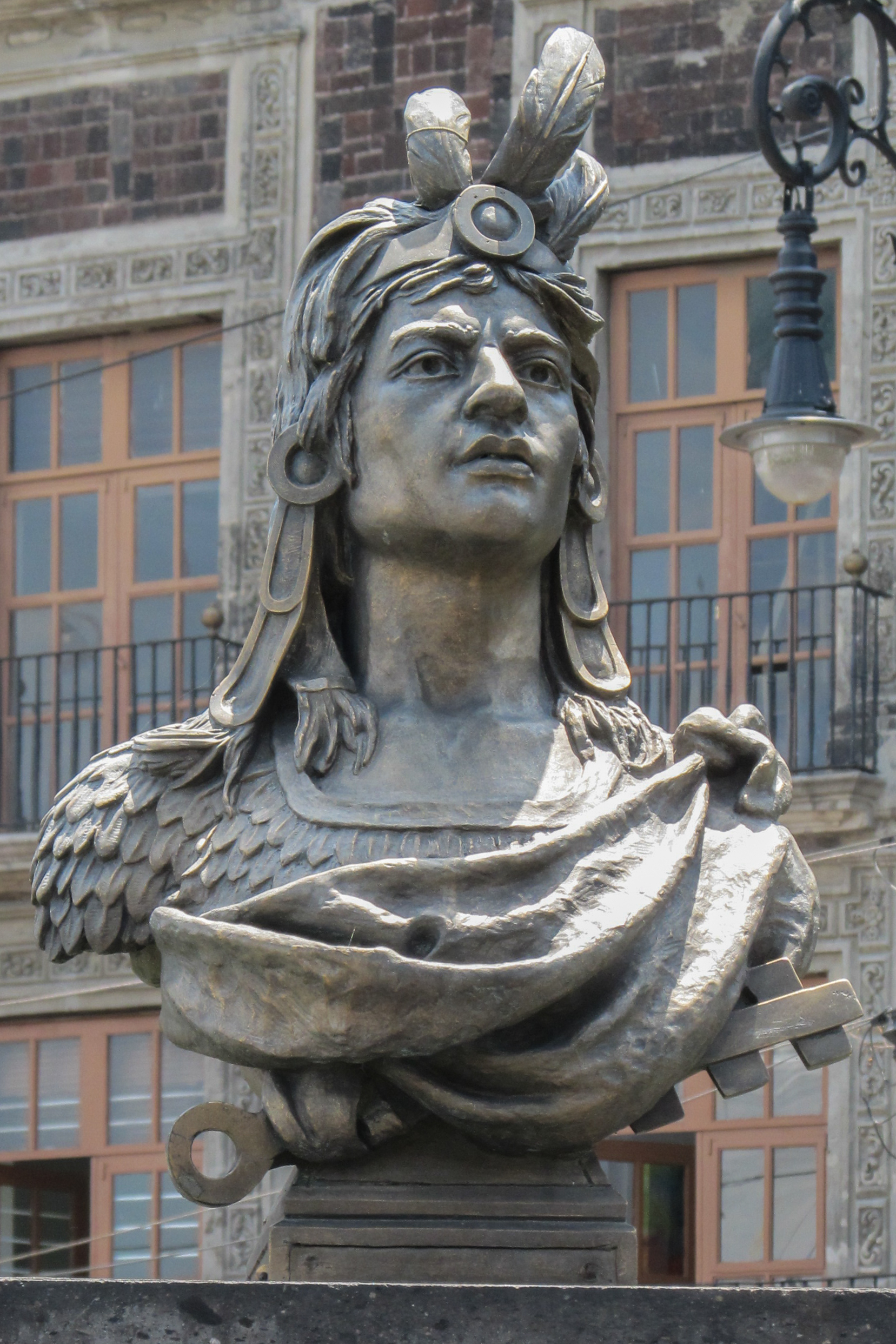 Busto de Cuauhtémoc en el Zócalo, Ciudad de Mexico.